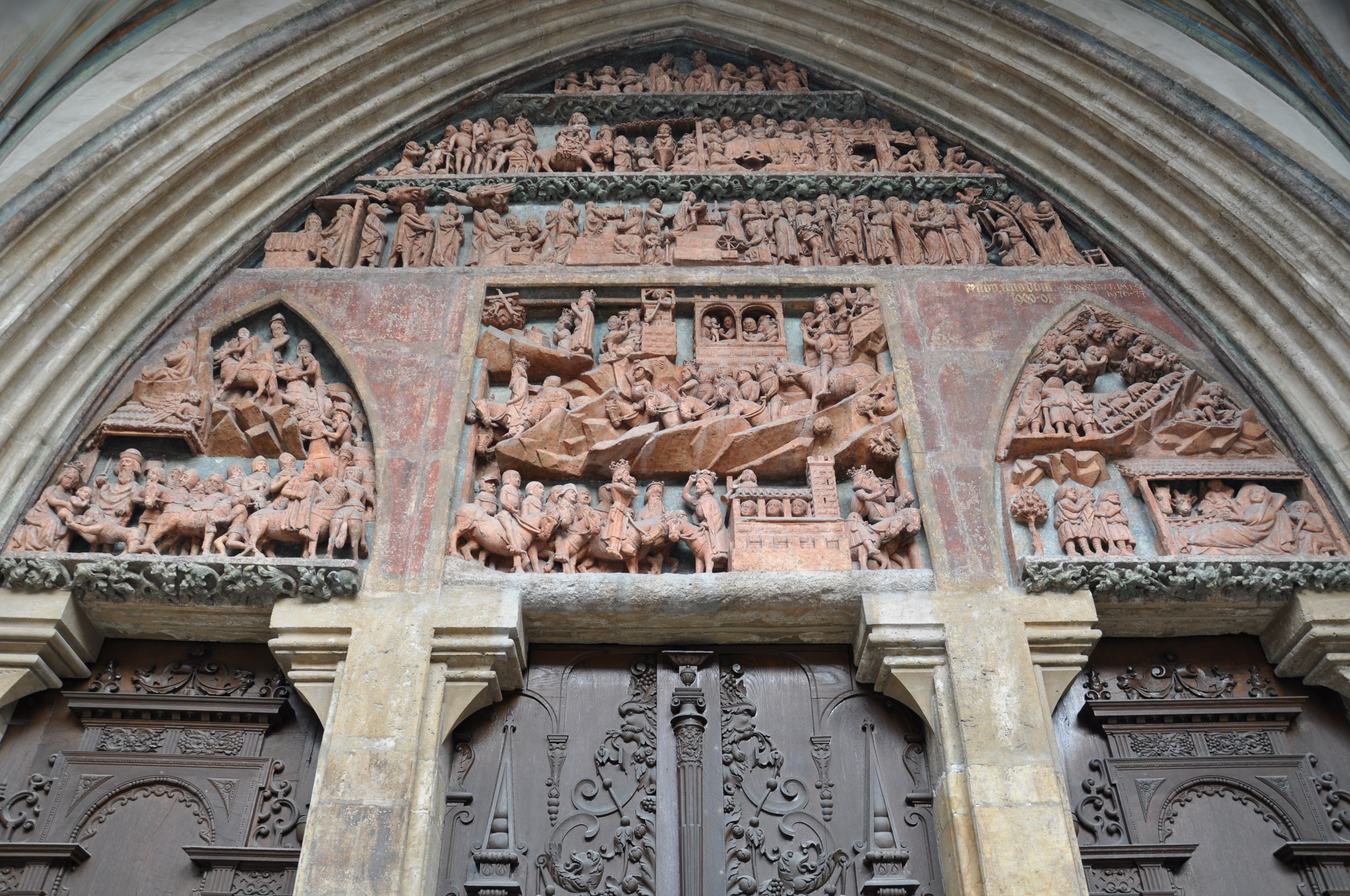 Ulm, Ulmer Münster, Südwestportal (Großes Marienportal)